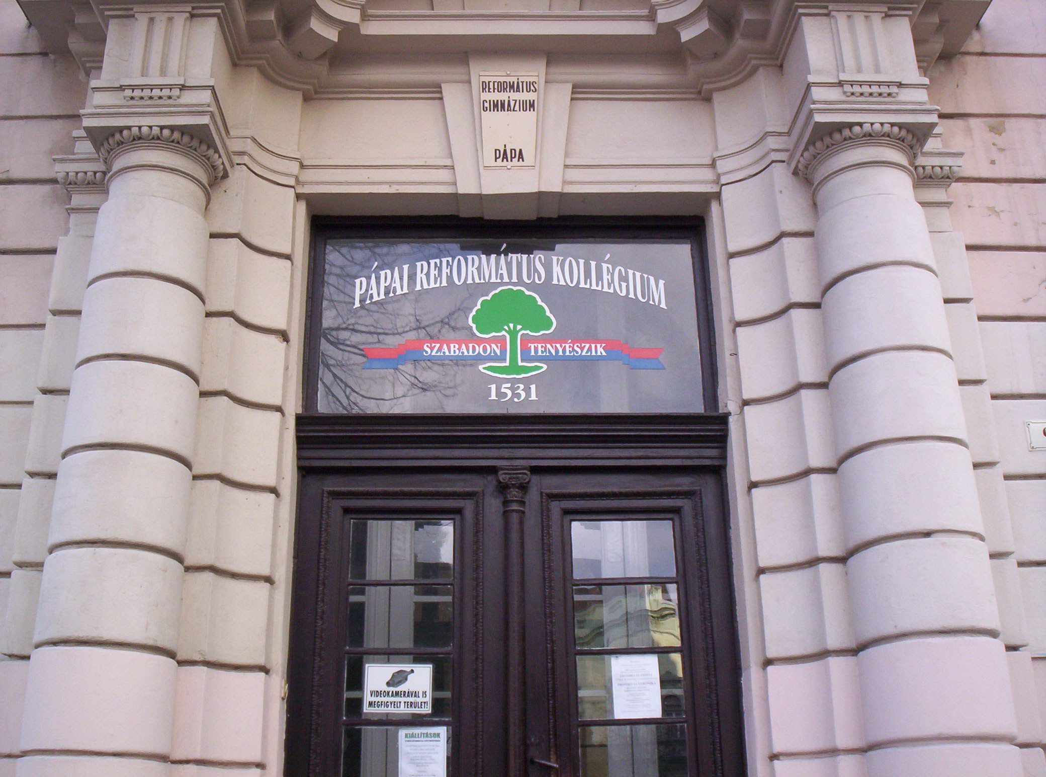 Motto of the Pápa Reformed College: "Szabadon tenyészik" ("Breeds free"), above the main entrance of the grammar school.A Pápai Református Kollégium jelmondata: "Szabadon tenyészik", a gimnázium főbejárata felett.